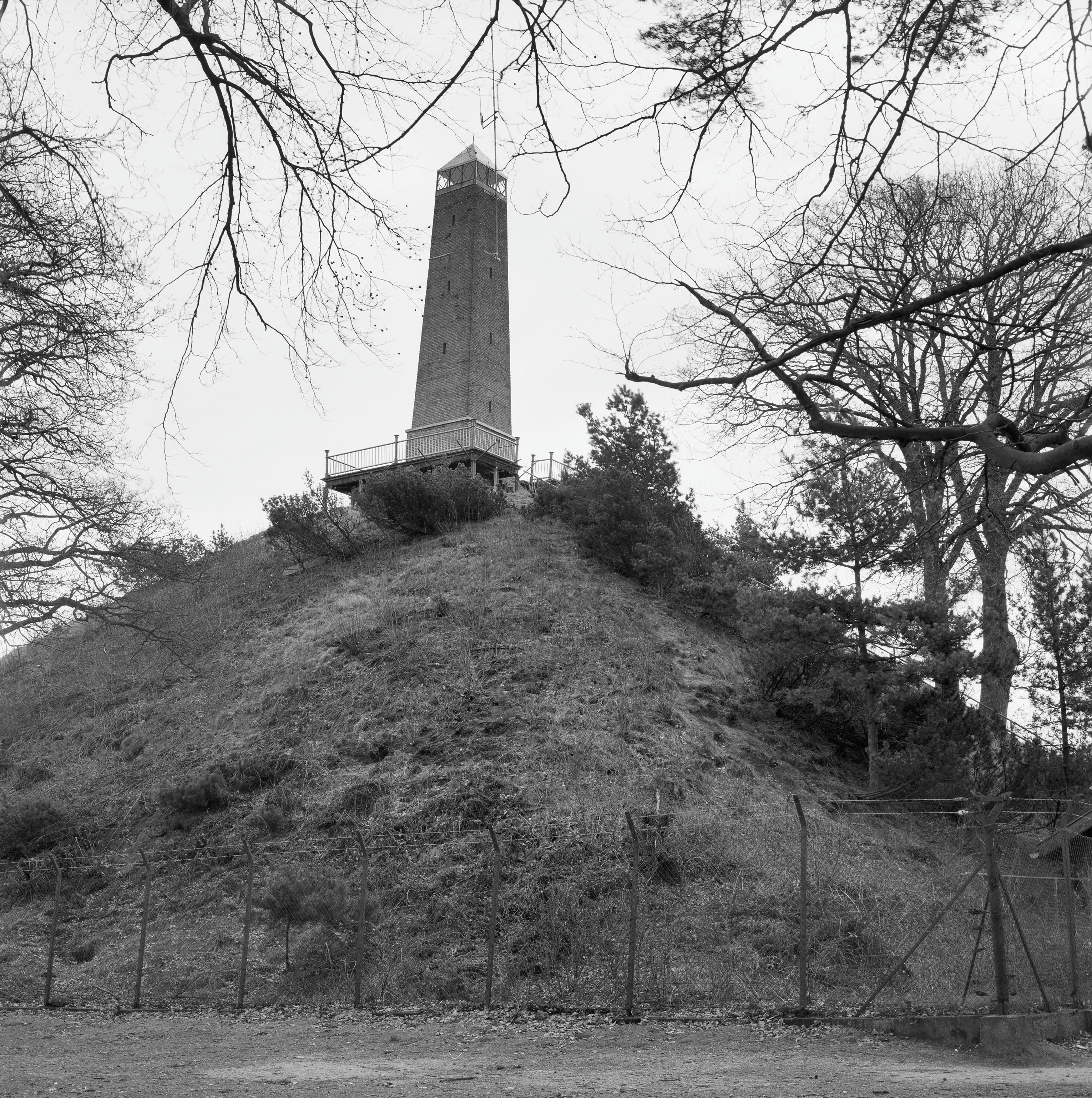 Pyramide Van Austerlitz: Exterieur OVERZICHT